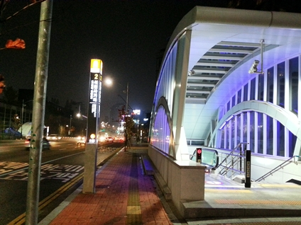 석천사거리역 2번 출입구 야간. 좌측 길은 구월로.